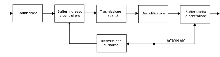 Schema di sistema a controllo di errore Automatic Request-Repeater (ARQ)